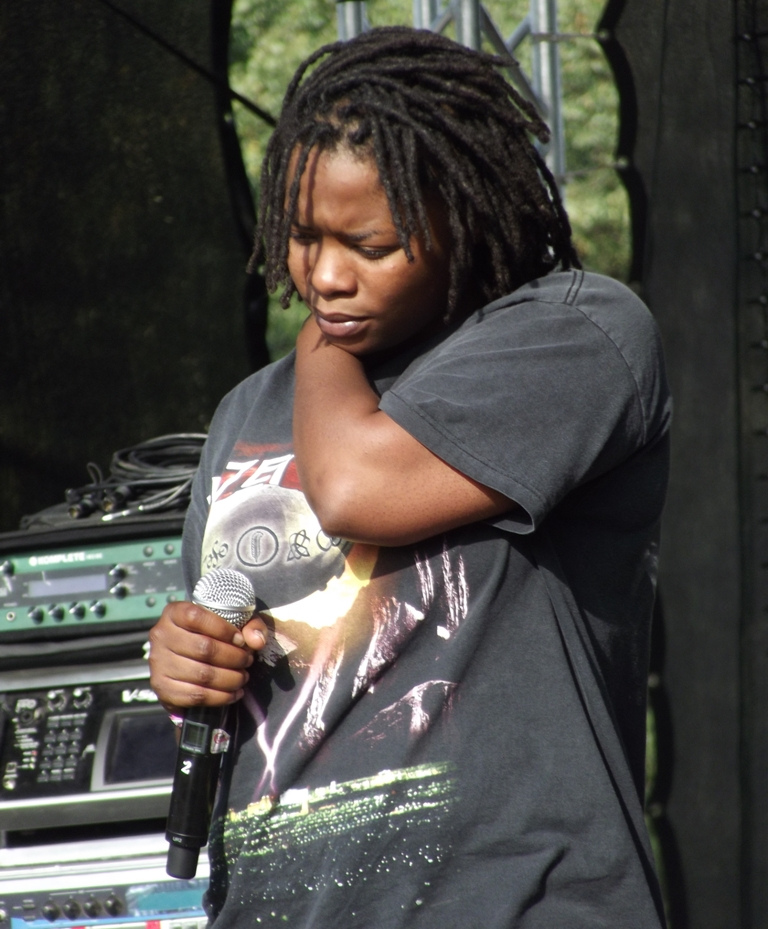 Zdjęcie zrobione podczas festiwalu muzycznego Tauron Nowa Muzyka 2012 w Katowicach.